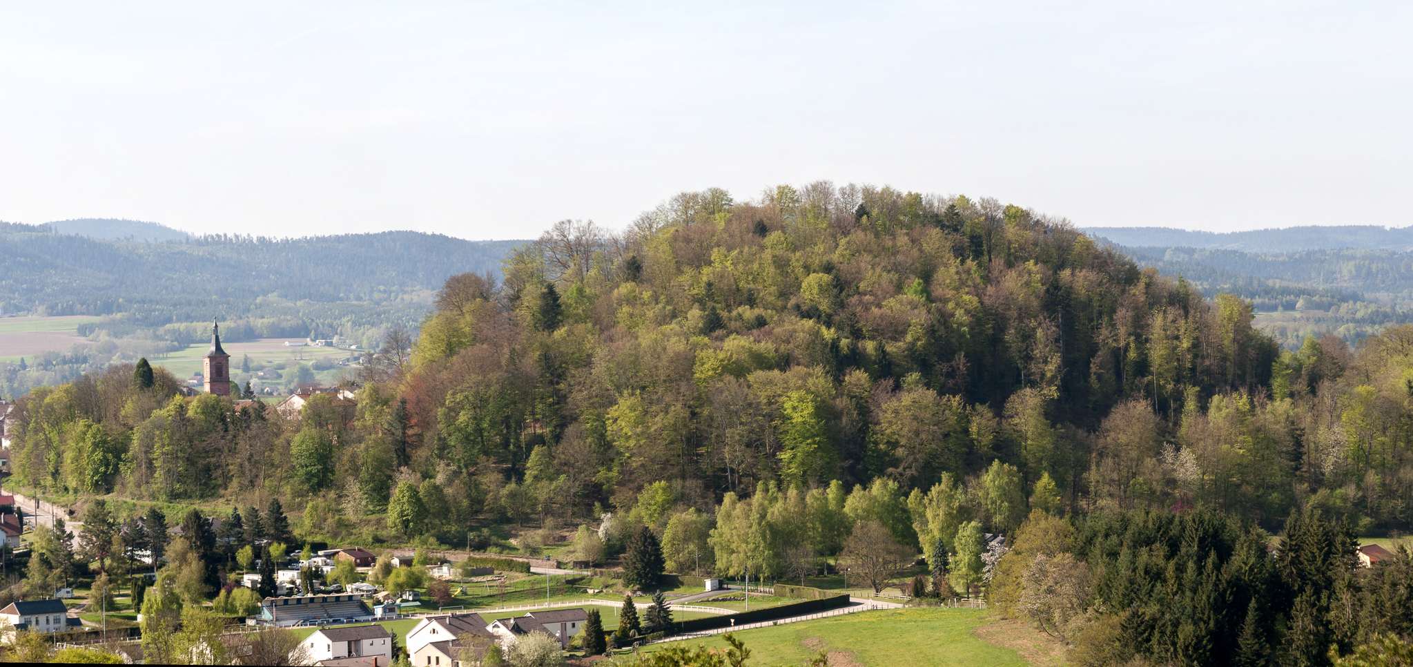 Bruyères dans les Vosges : vue sur la colline du Château depuis la Roche de Fouchon.